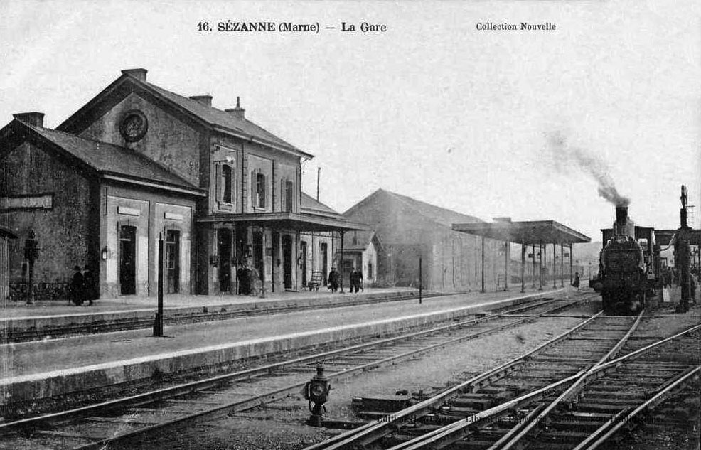 La gare de Sézanne vers 1900. Le bâtiment voyageurs bien que fermé et désaffecté est toujours présent en 2011.